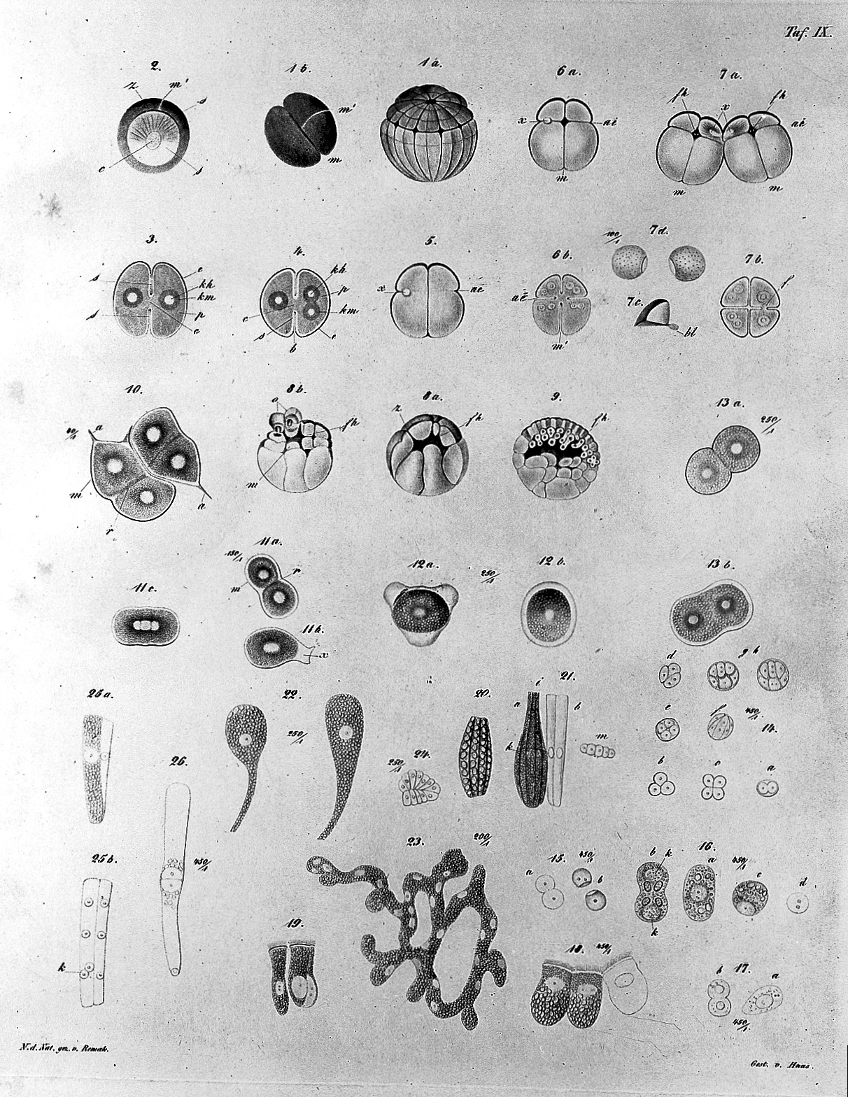 Remak "Untersuchungen uber die...", 1855 Wellcome Images